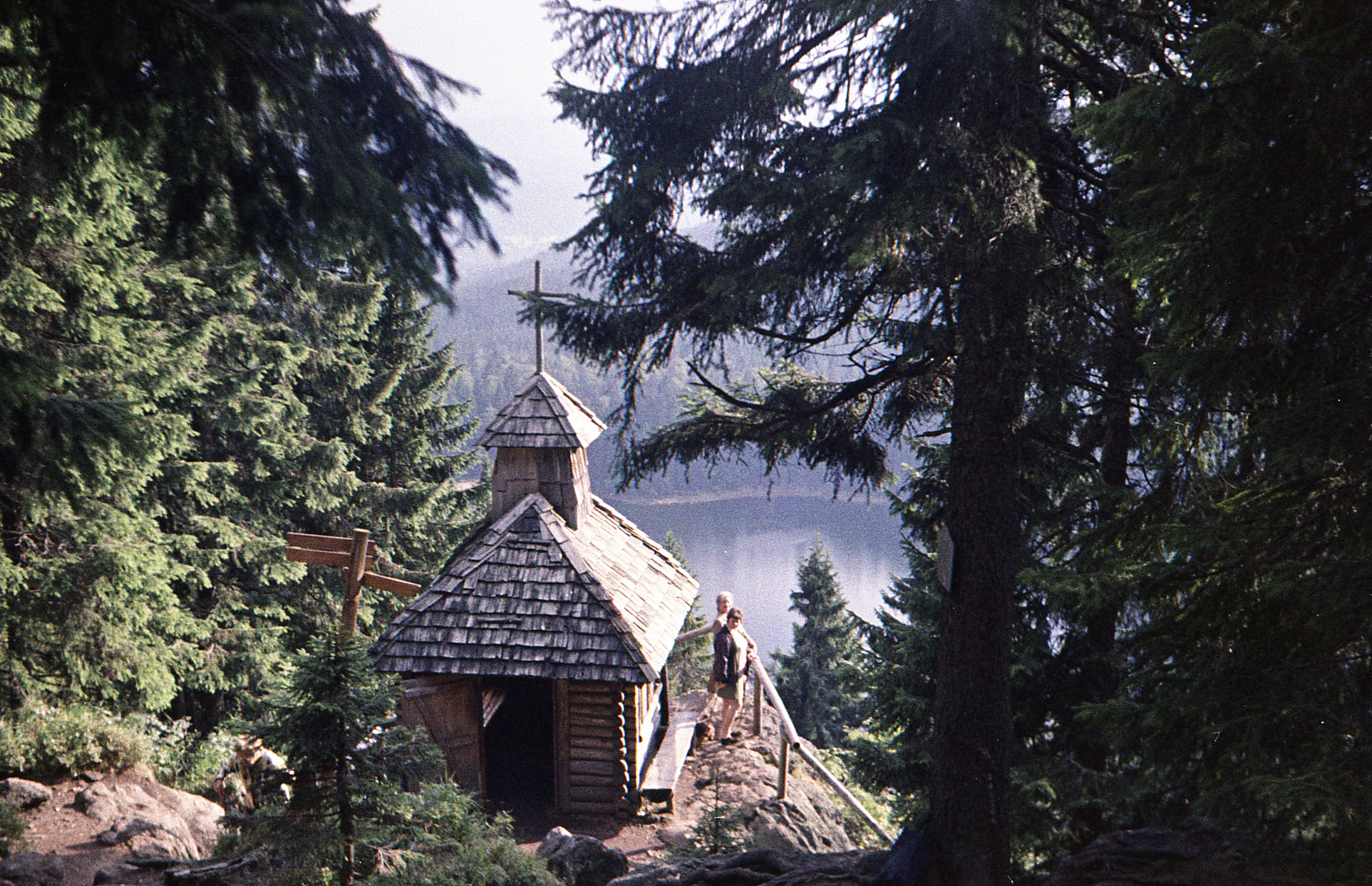 Diese zweite Rachelkapelle fiel am 19. März 1972 ebenfalls einem Brand durch Brandstiftung zum Opfer.